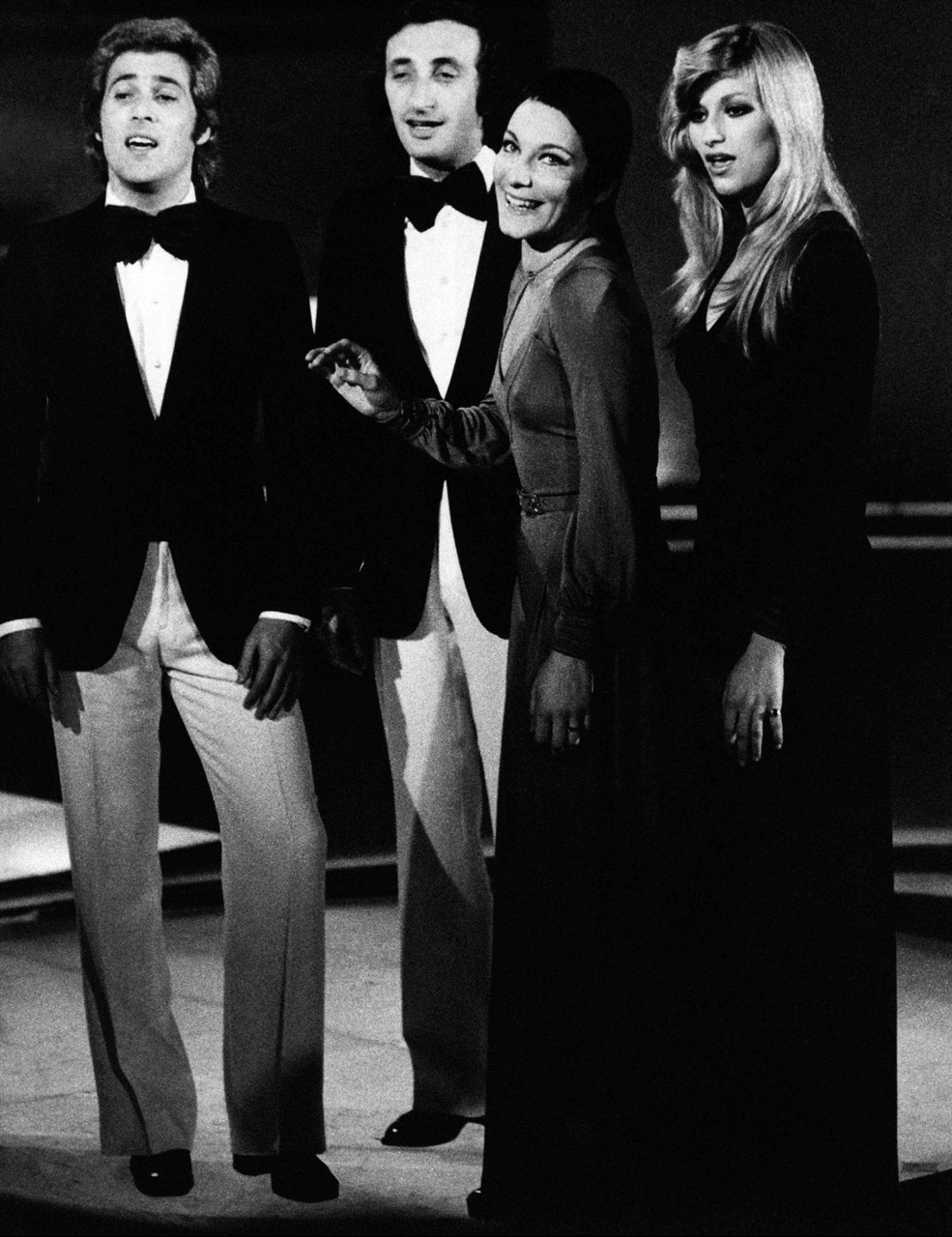 Il gruppo italiano Ricchi e Poveri negli anni 70; da sinistra verso destra: Angelo Sotgiu, Franco Gatti, Angela Brambati e Marina Occhiena